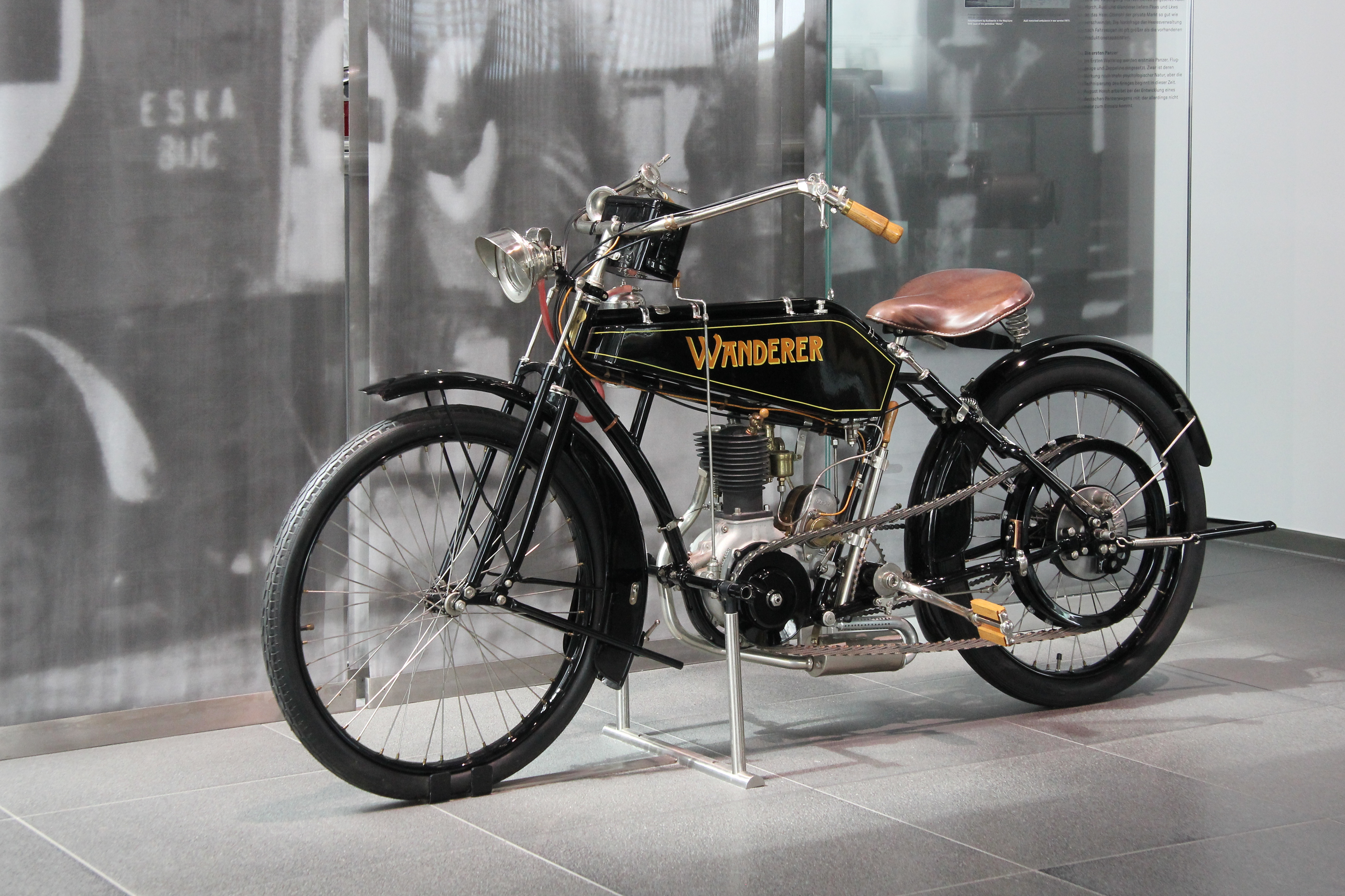 Wanderer 2 PS, 1-Zyl.-Viertaktmotor, Leistung 3 PS, 251 cm³, 60 km/h, Verbrauch 3 Liter auf 100 km, Preis 810 Mark, gebaut von 1914 bis 1919, im museum mobile in Ingolstadt. Das ausgestellte Motorrad ist Baujahr 1914.